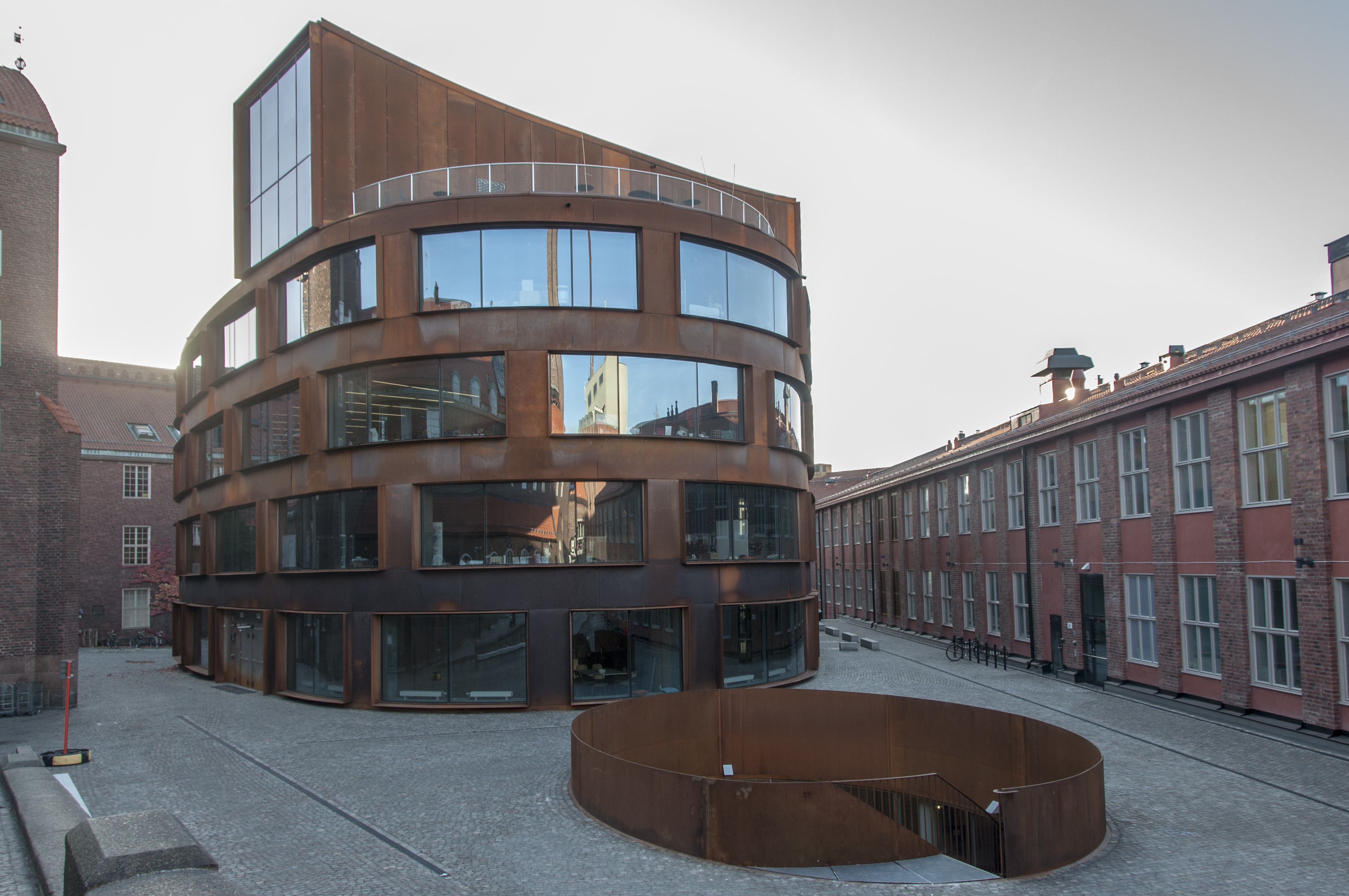 Arkitekturskolans byggnad på KTH, Osquars backe 9. Byggår 2013-2015. Arkitekter Tham & Videgård Arkitekter